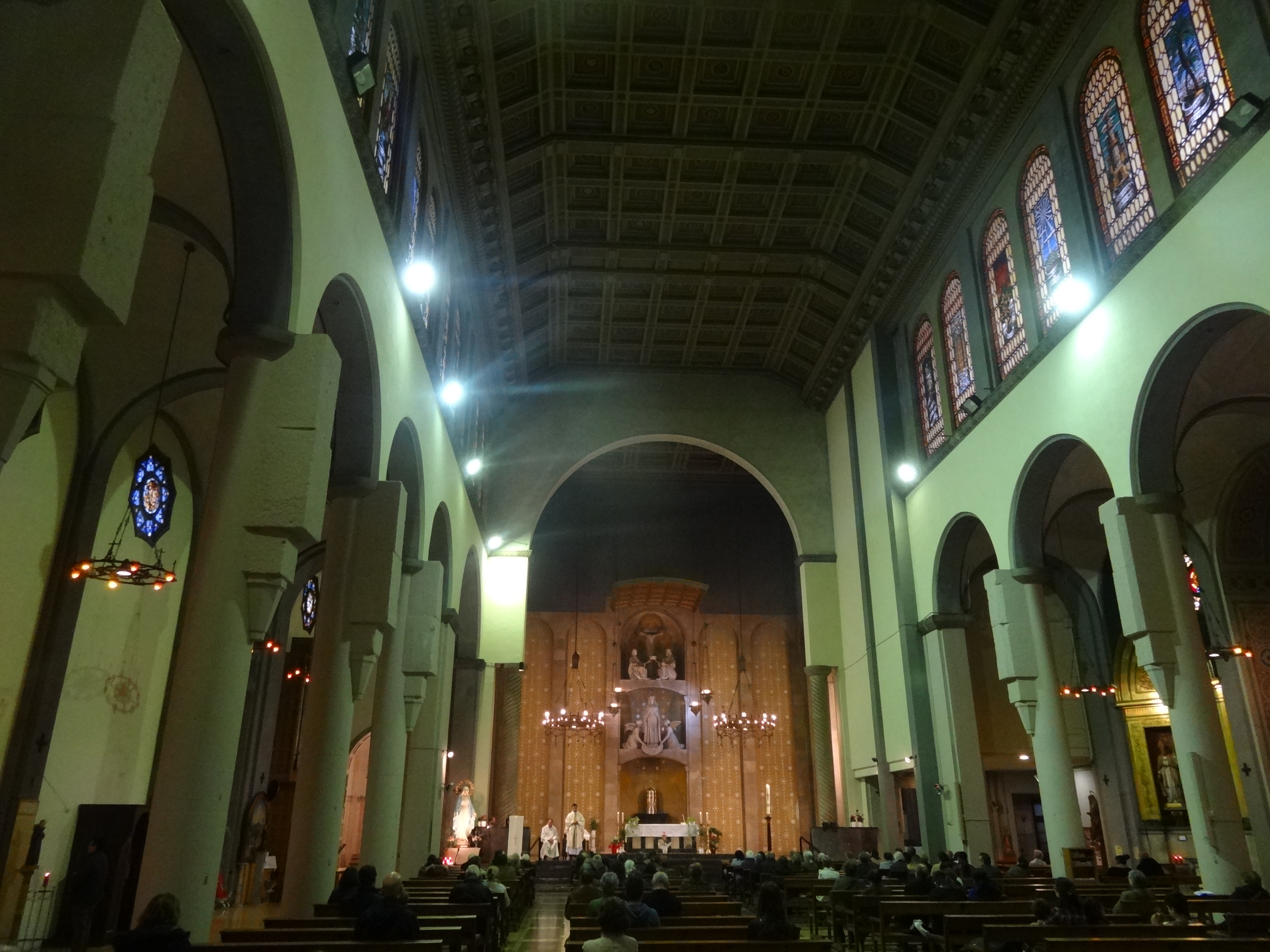 Parròquia de Santa Maria de Gràcia, Barcelona. Al carrer de Gràcia, 3-5.